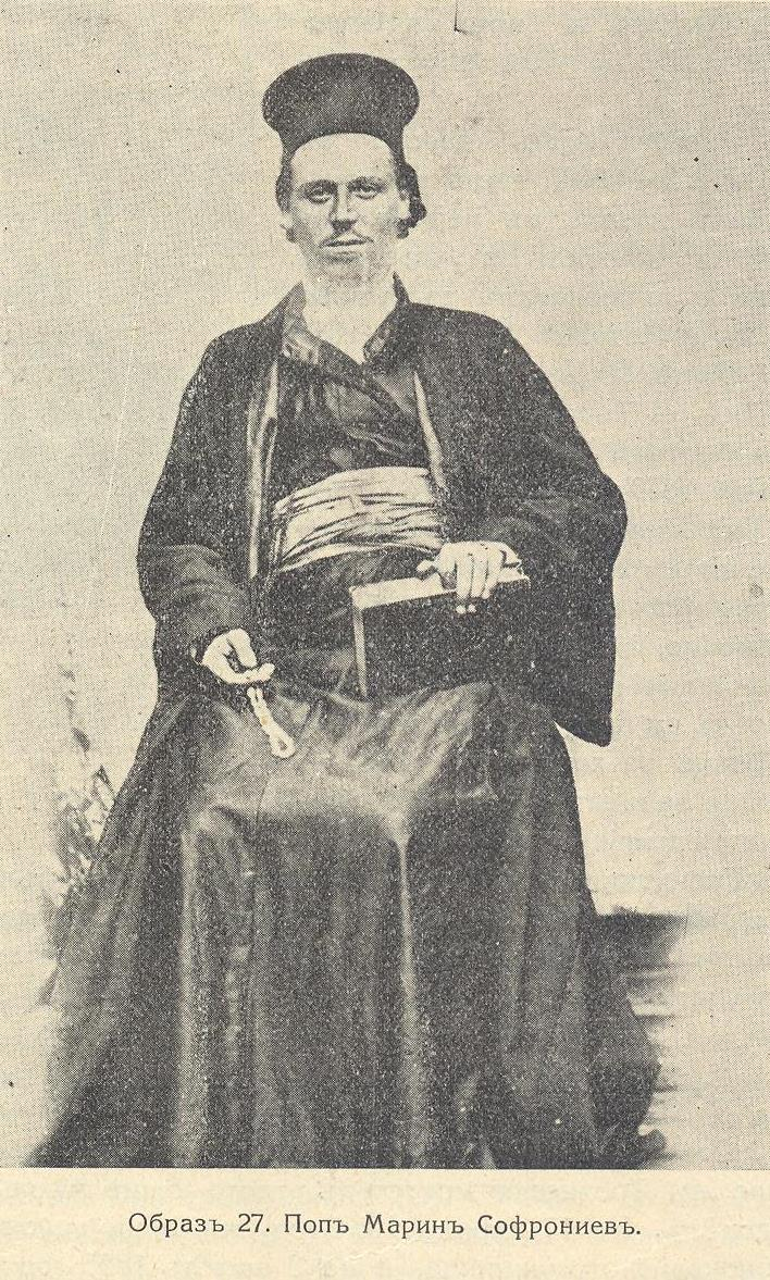 Ловеч и Ловчанско, книга 3, 1931, стр. 126 - Поп Марин Софрониев